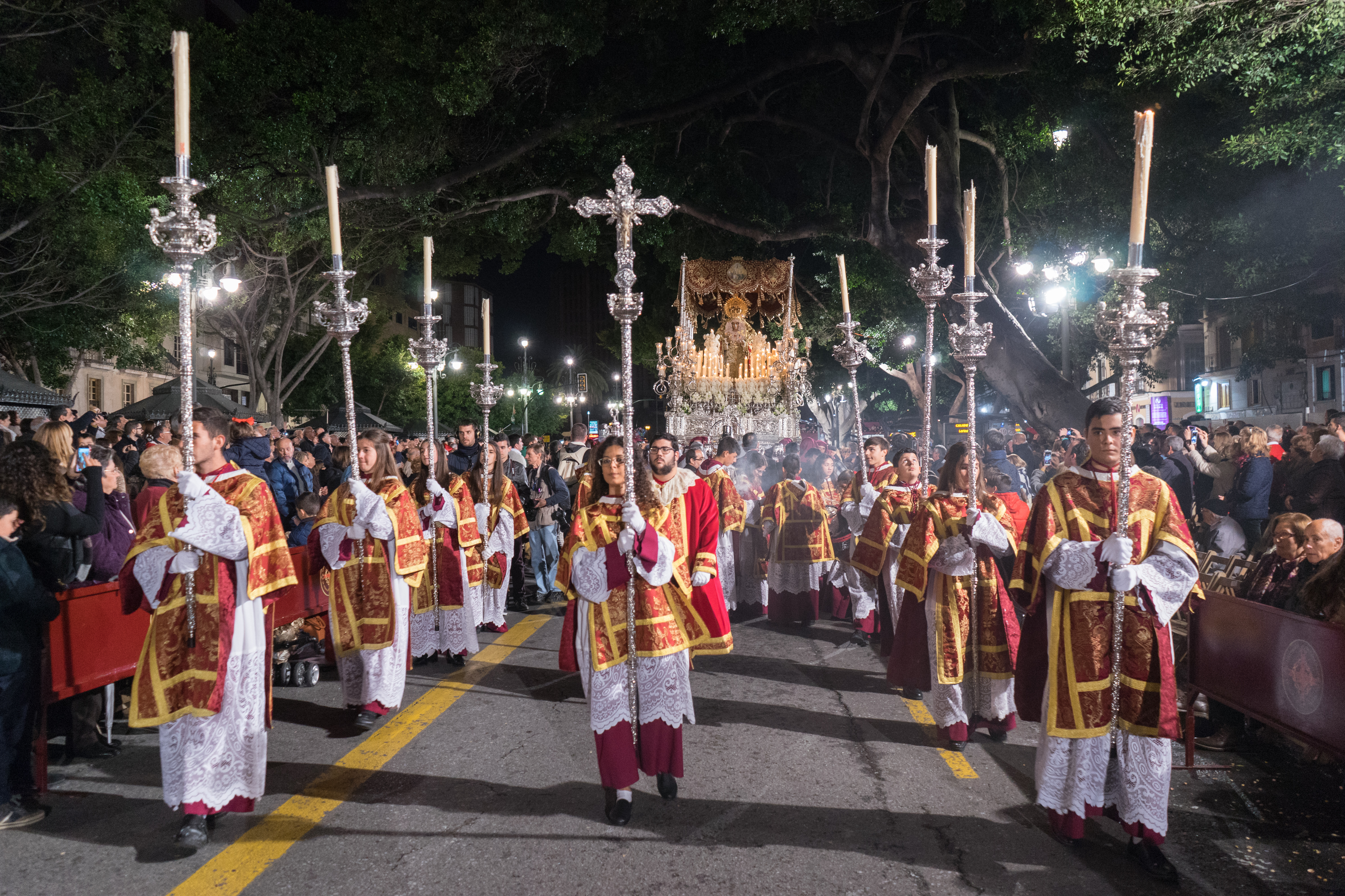 Trono de María de la Excelentísima, Muy Ilustre y Venerable Hermandad y Cofradía de Nazarenos de Nuestro Padre Jesús de la Columna y María Santísima de la O, popularmente, Hermandad de los Gitanos This is a photography of a Folklore festival in Spain (Wikidata id Q9075883).